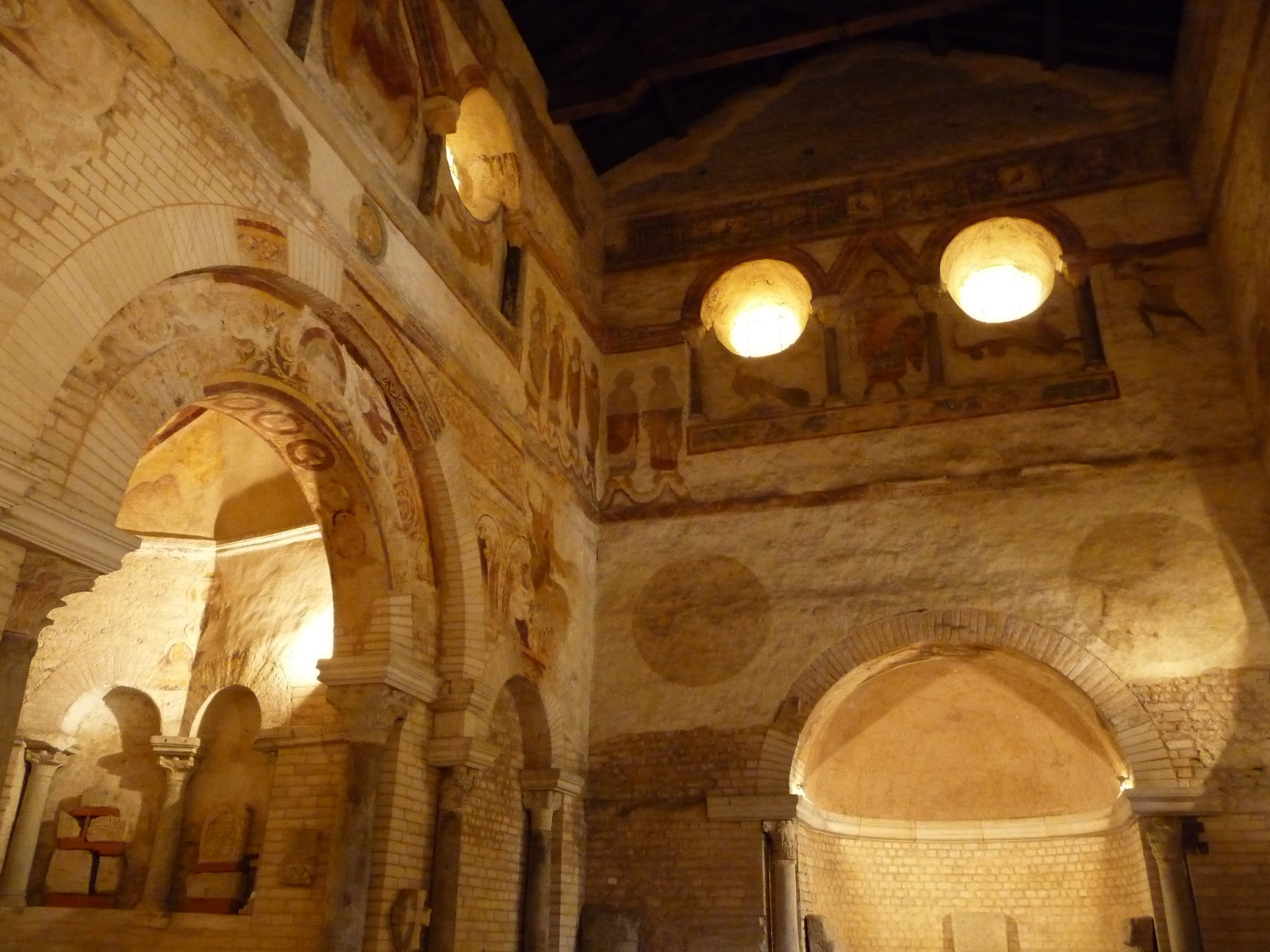 Intérieur du Baptistère Saint Jean à Poitiers. Les oculi couronnés par des arcs plein cintre ont remplacé deux baies en plein cintre dont on voit encore l'emplacement délimité par des colonnettes. Ils sont reliés par un arc en mitre. Les trois éléments forment un triolet composé à l'inverse de celui qui se trouve juste au-dessus à l'extérieur et qui est donc composé de deux arcs en mitre autour d'un arc plein cintre.